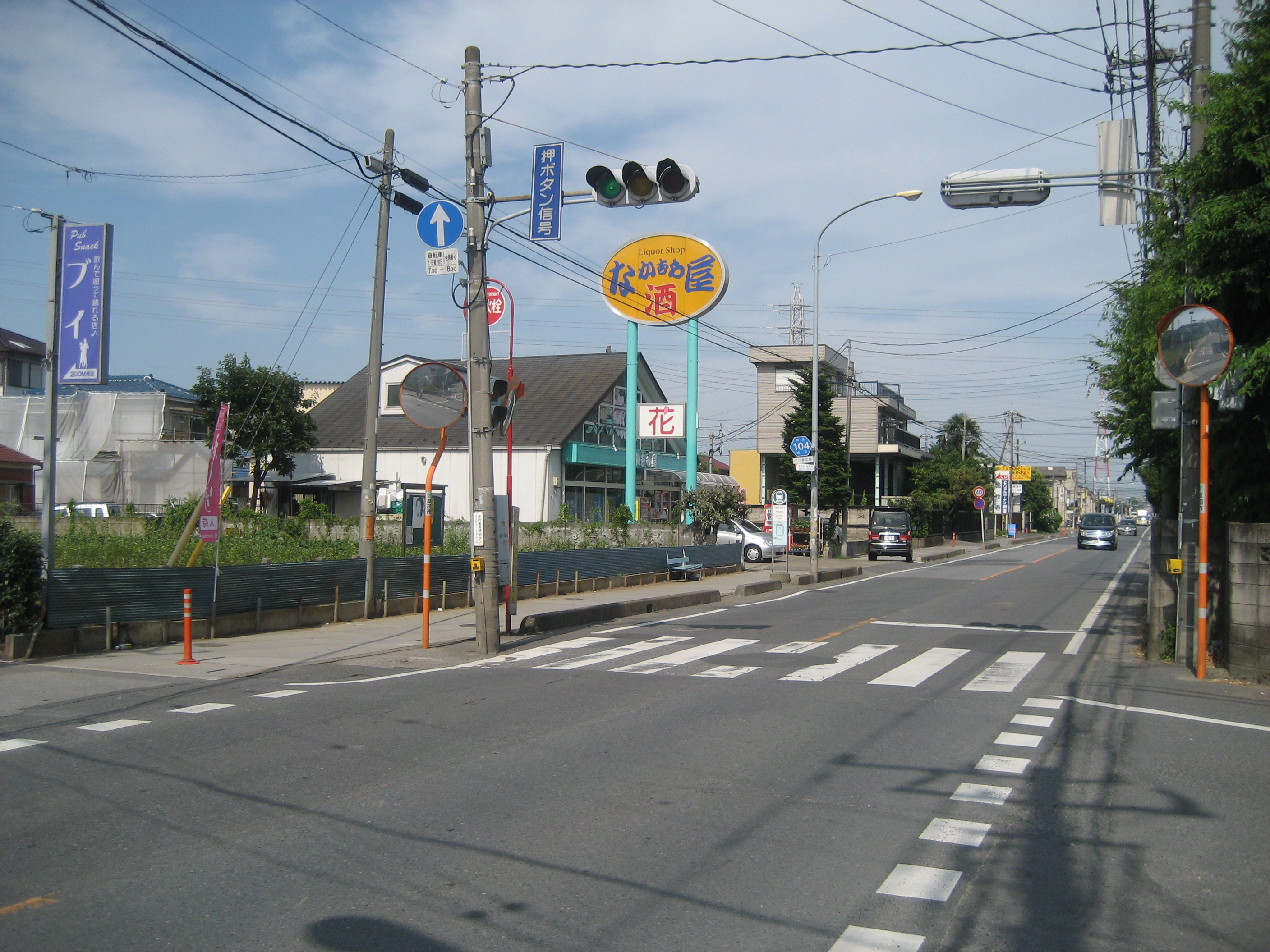 埼玉県道104号線草加市内